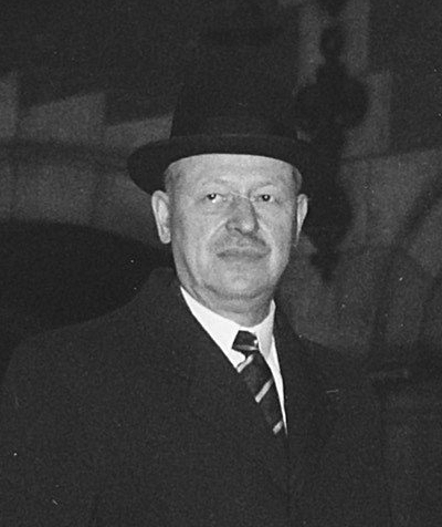 Original caption: "Benelux-conferentie in Den Haag van 10 t/m 12 maart 1949. De Luxemburgse delegatie. " — Nationaal Archief